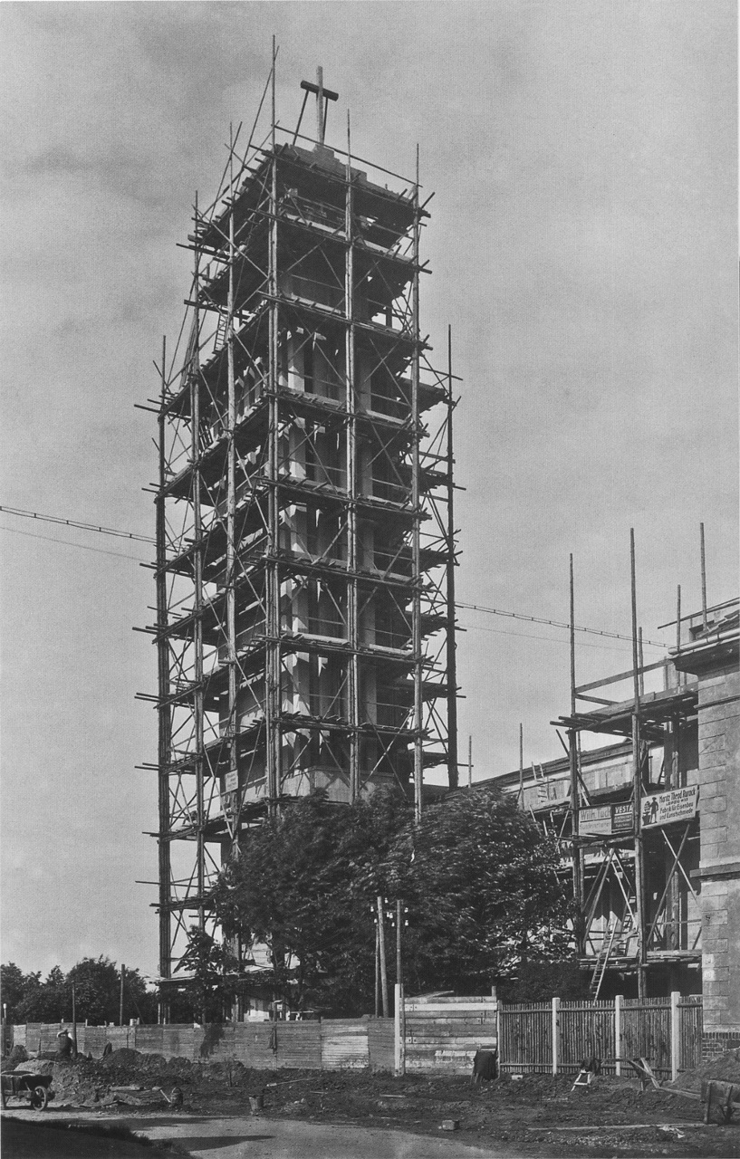 Baustelle der Versöhnungskirche in Leipzig-Gohlis, Clausewitzstraße 44 (heute Franz-Mehring-Straße).Architekt: Hans Heinrich Grotjahn